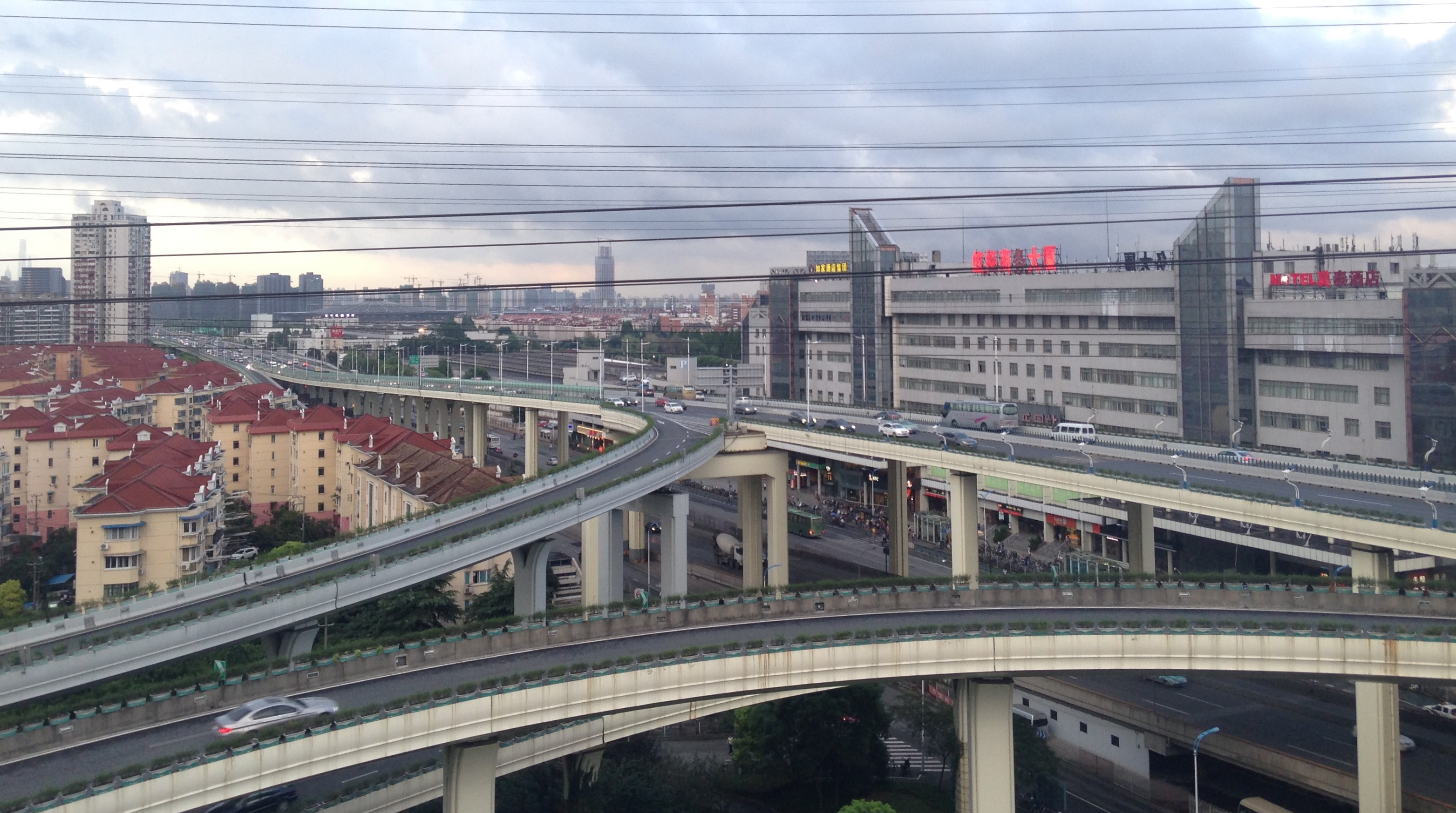 錦江楽園駅付近の景色